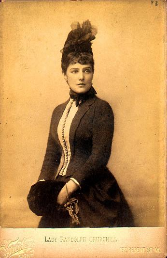 Jennie Jerome (later Jennie Churchill)